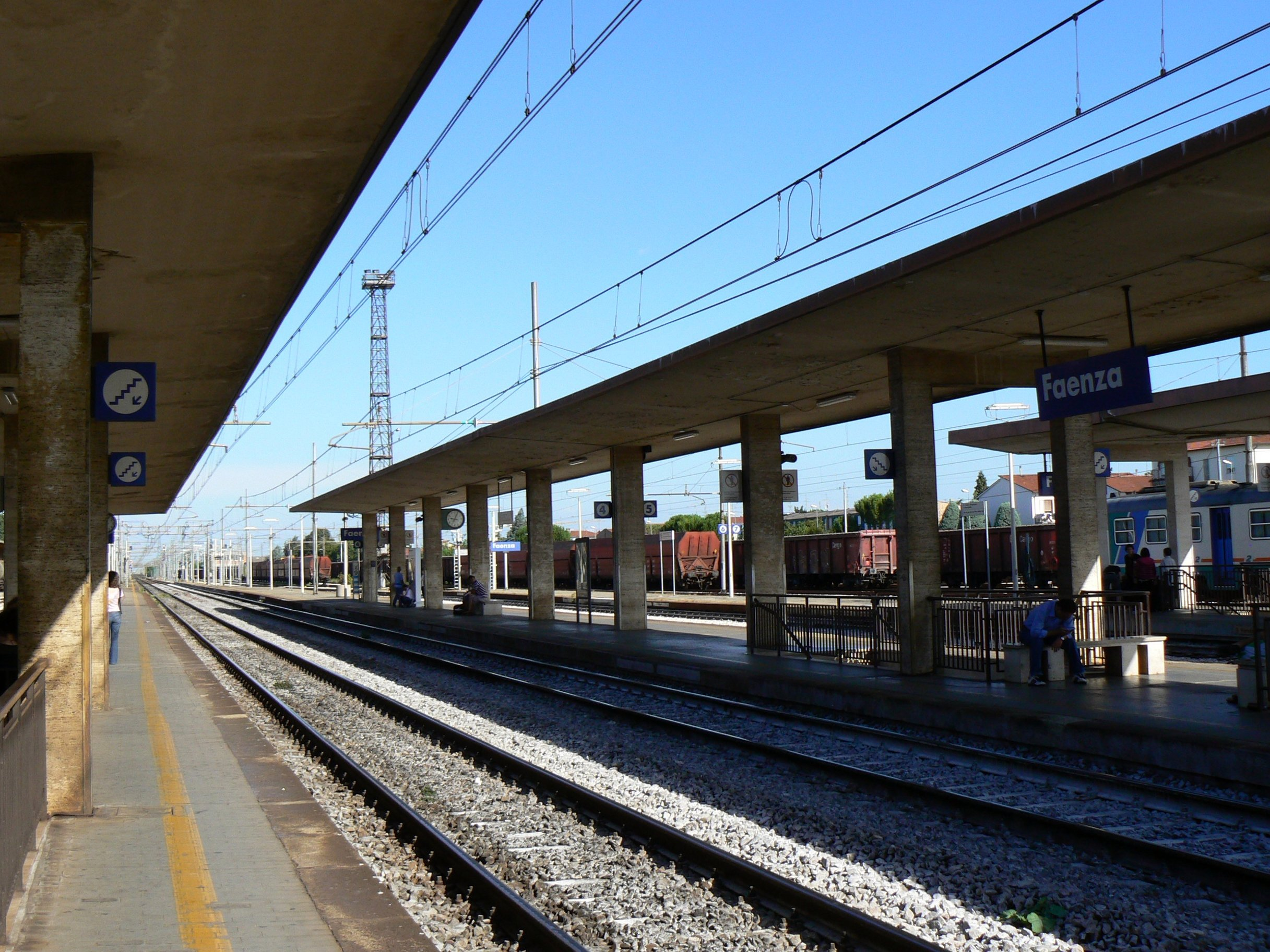 Stazione ferroviaria di Faenza